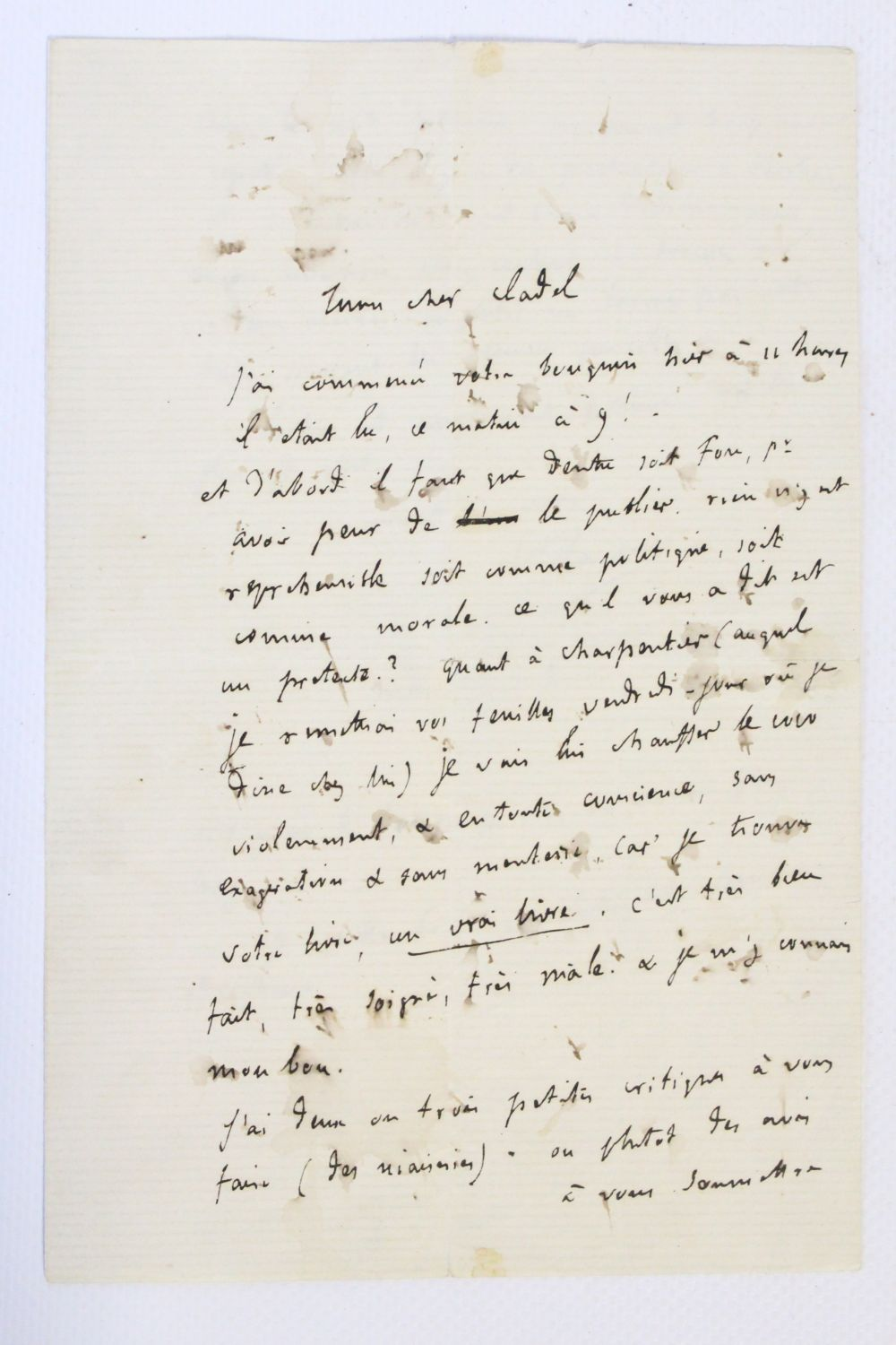 Letter from Gustave Flaubert to Léon Cladel.